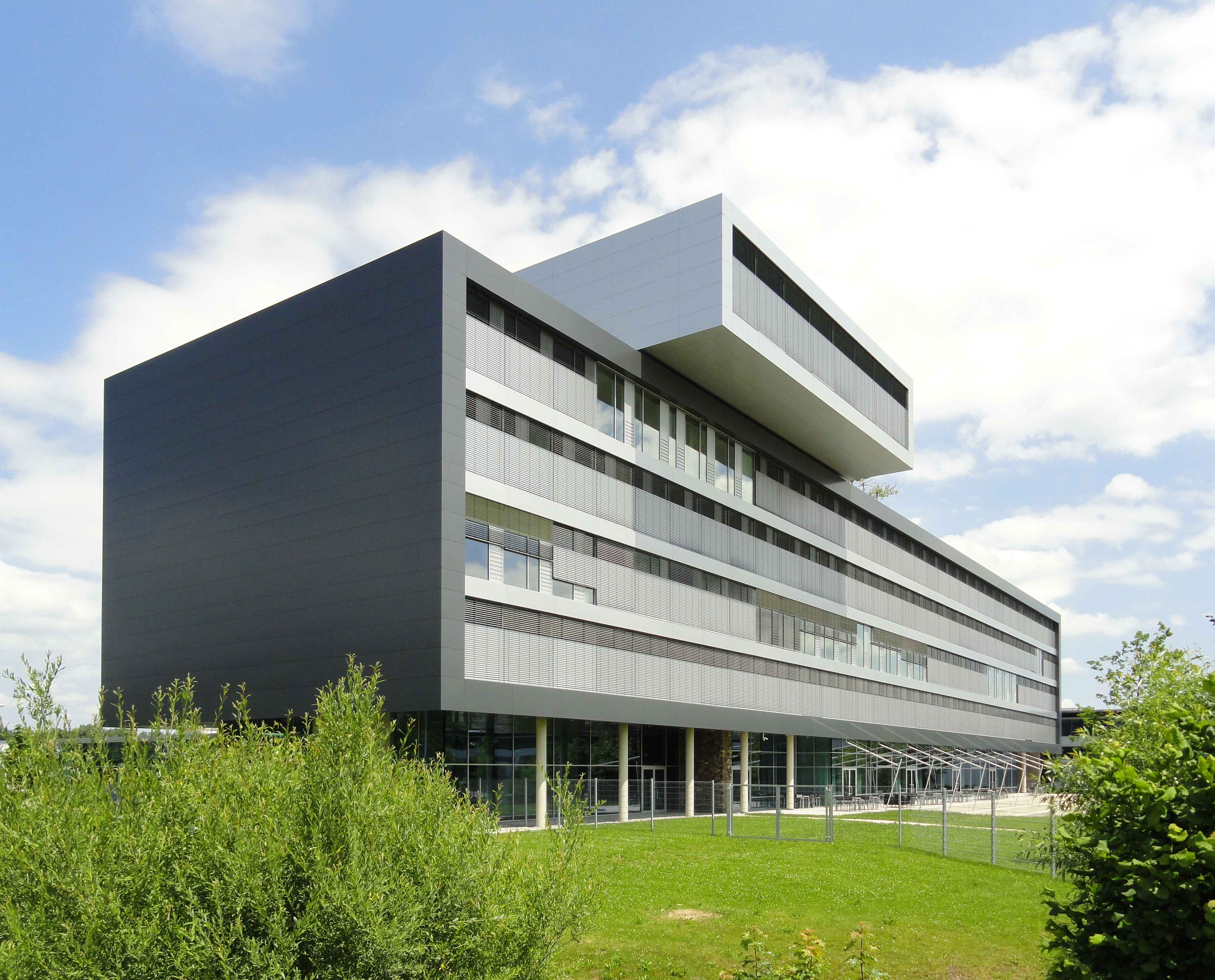 Dachser Zentrale in Kempten - Memminger Straße